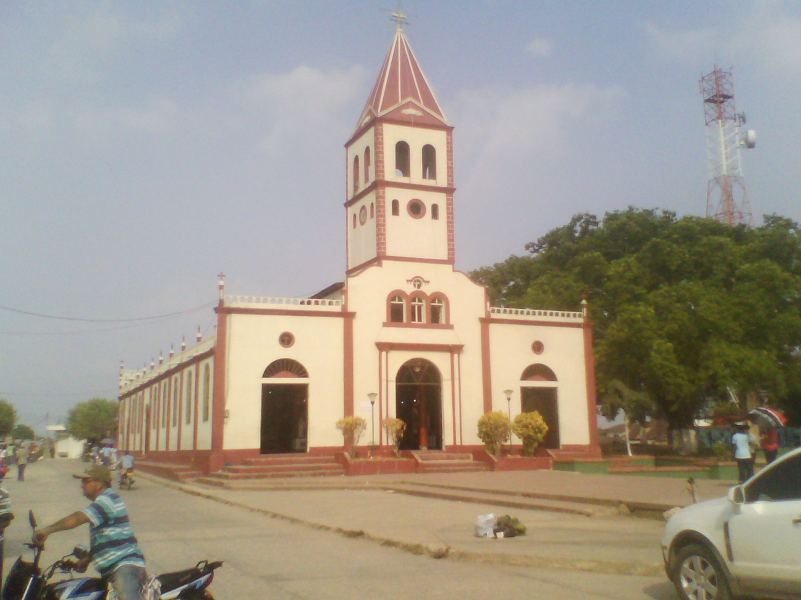 Frente de la Iglesia de San Onofre.